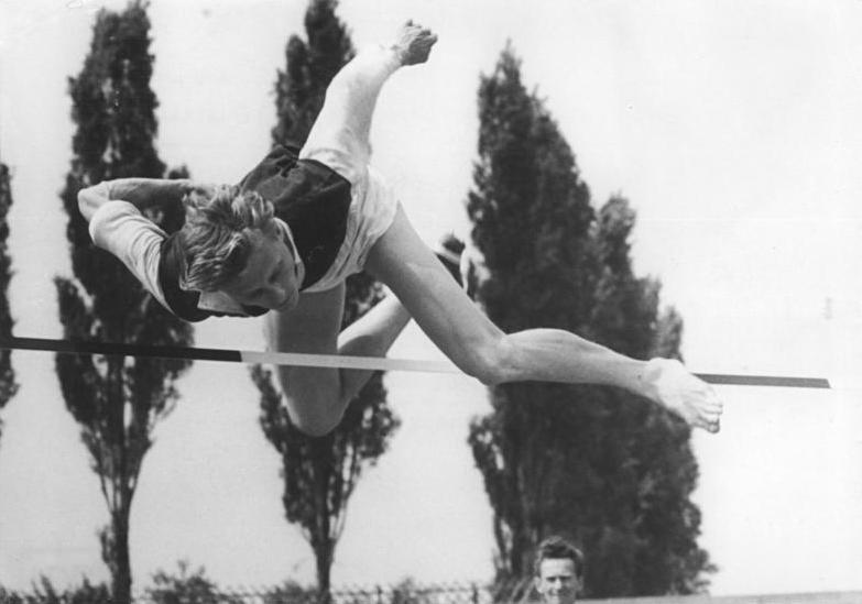 Günter Lein Zentralbild Funck 22.6.1956 Ein Besuch beim SC-Rotation Leipzig. Der erst im Februar 1955 gegründete Sport-Club ist 750 Mitgliedern in 7 Sektionen einer der stärksten Clubs der DDR geworden. 26 hauptamtliche Trainer betreuen die Sportler. Die wissenschaftliche Trainigsarbeit hat sich bewährt, das beweisen 17 Meister des Sports, die aus diesem Sportclub hervorgegangen sind. UBz: Der zur Zeit beste Hochspringer der DDR Günter Lein während des Trainings.